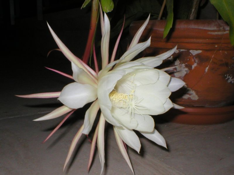 Epiphyllum oxypetalum, dite fleur de lune